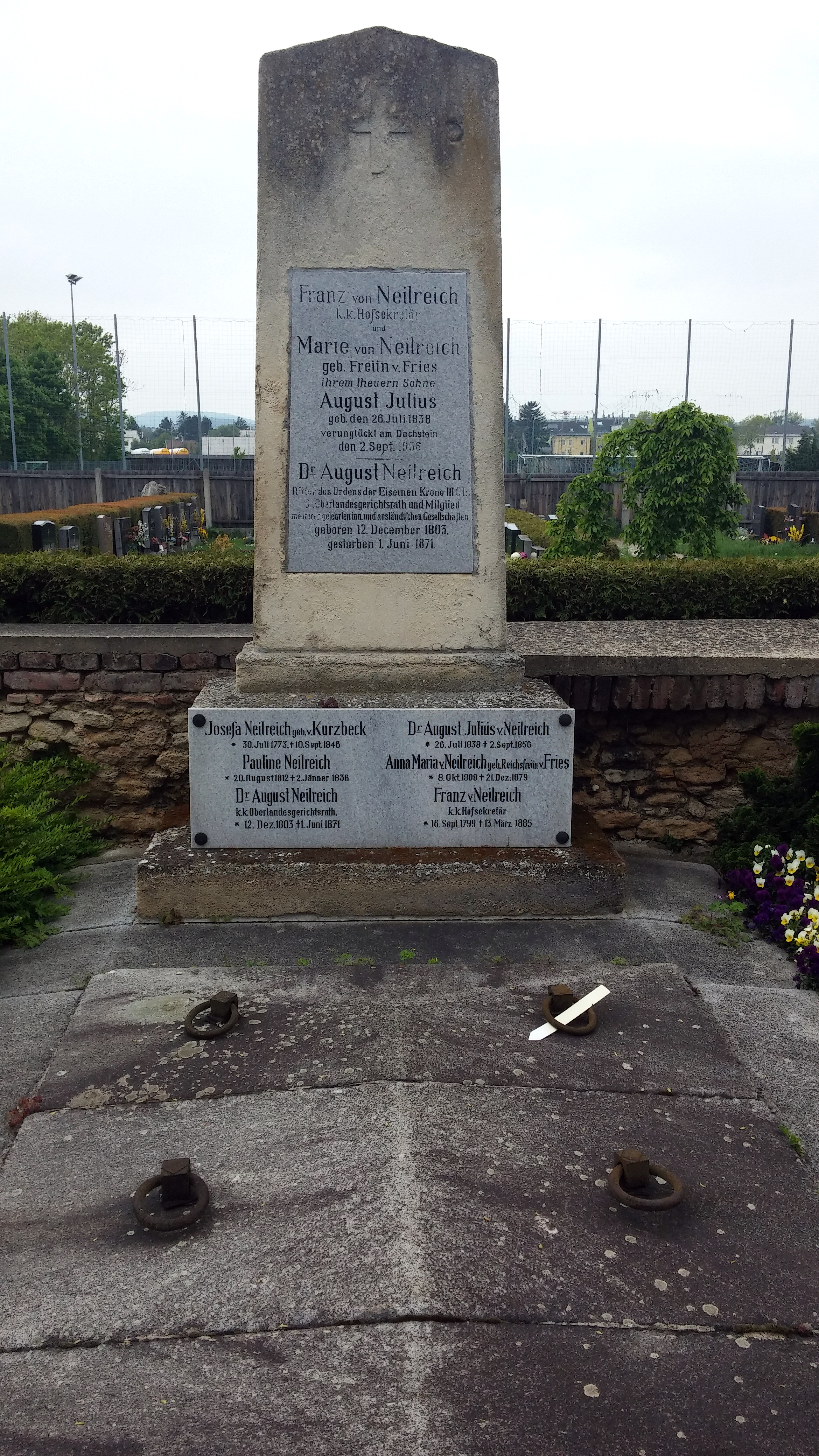 Familiengruft der Familie Neilreich am Friedhof in Liesing, Gruppe 1 Gruft G 2